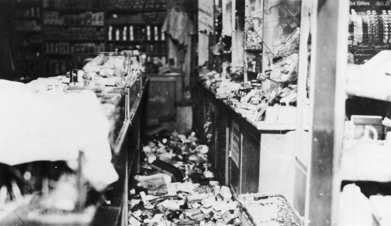 München, Kaufhaus Uhlfelder, Zerstörungen Reichskristallnacht", Zerstörungen beim Kaufhaus Uhlfelder, 9.-10.11.1938 [München.- Reichspogromnacht / "Reichskristallnacht".- Zerstörungen im Kaufhaus Heinrich Uhlfehlder GmbH]